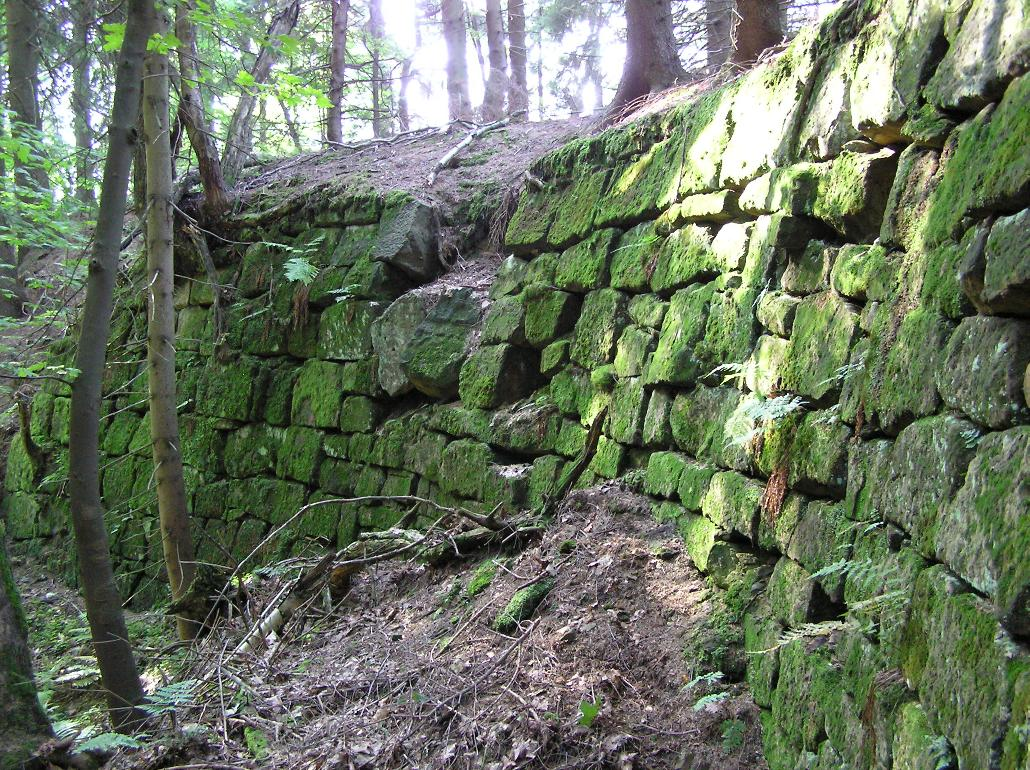 Ruinen des Fort Wilhelm bei (früher Voigtsdorf bei Habelschwerdt), Niederschlesien, Polen.